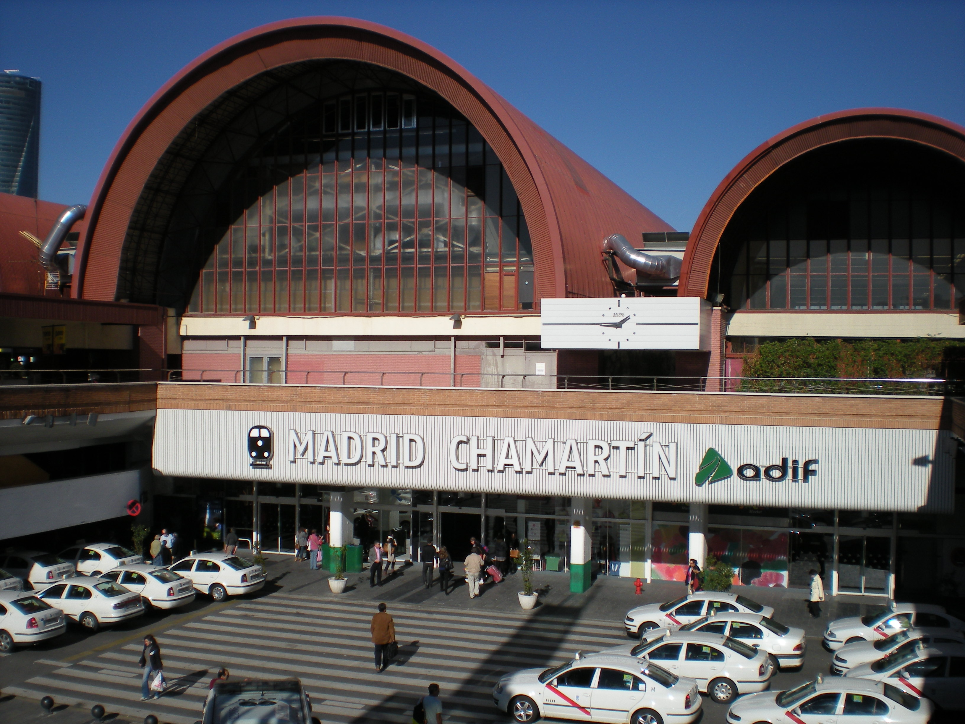 Fachada de la estación de Chamartín.